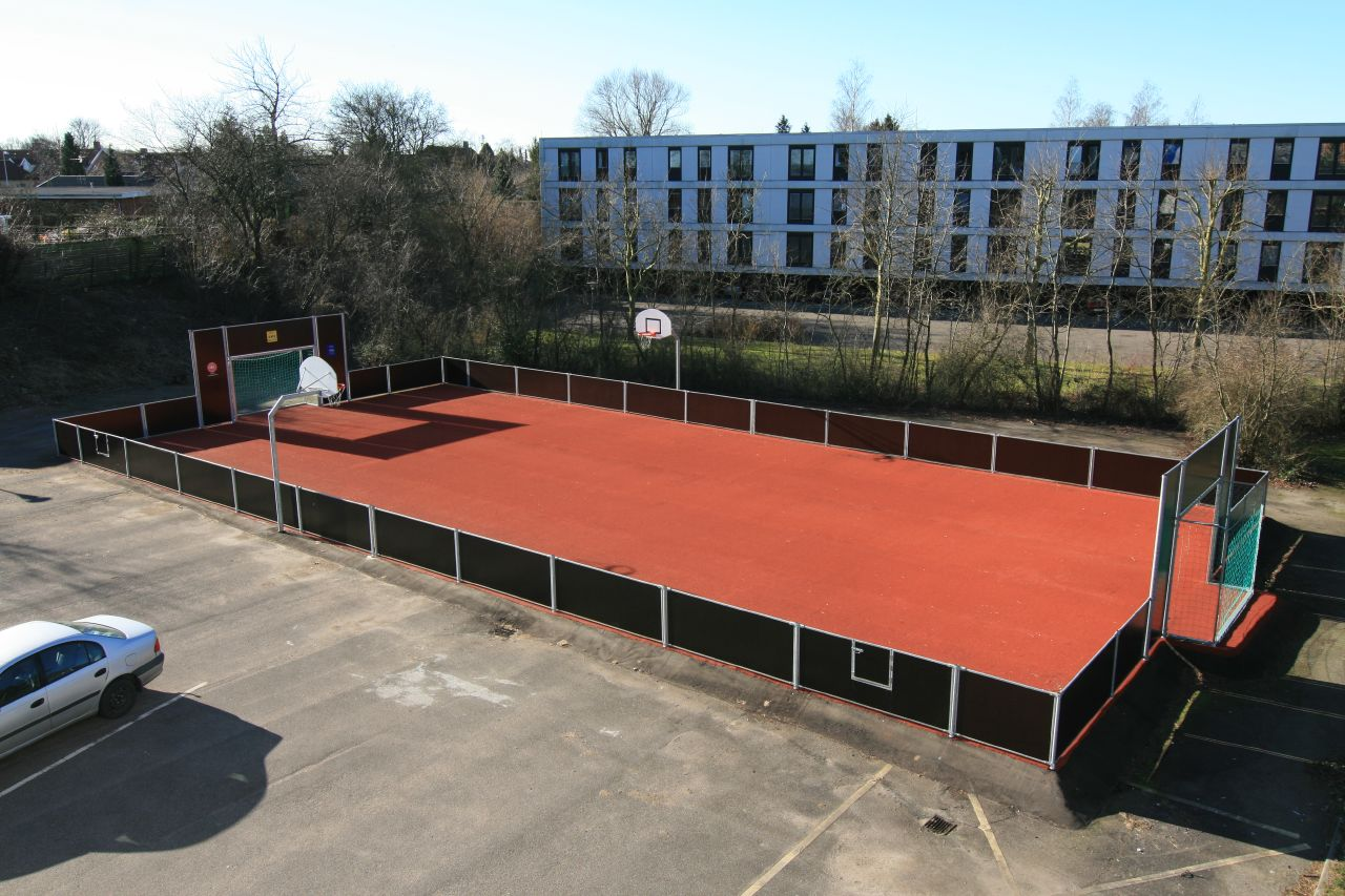 Billede af POP Kollegiet